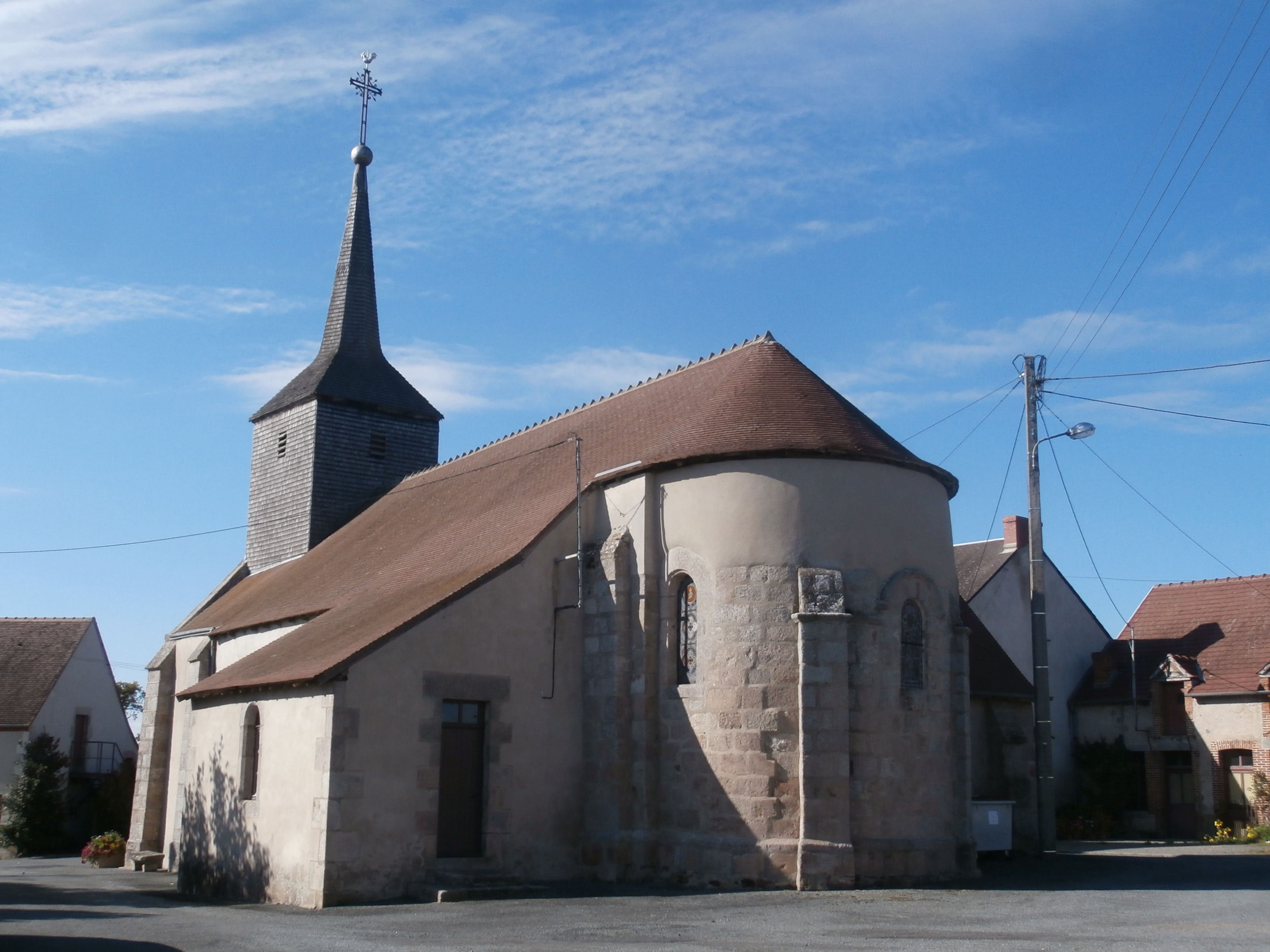 Église Saint-Désiré de Leyrat, du XIIe siècle.